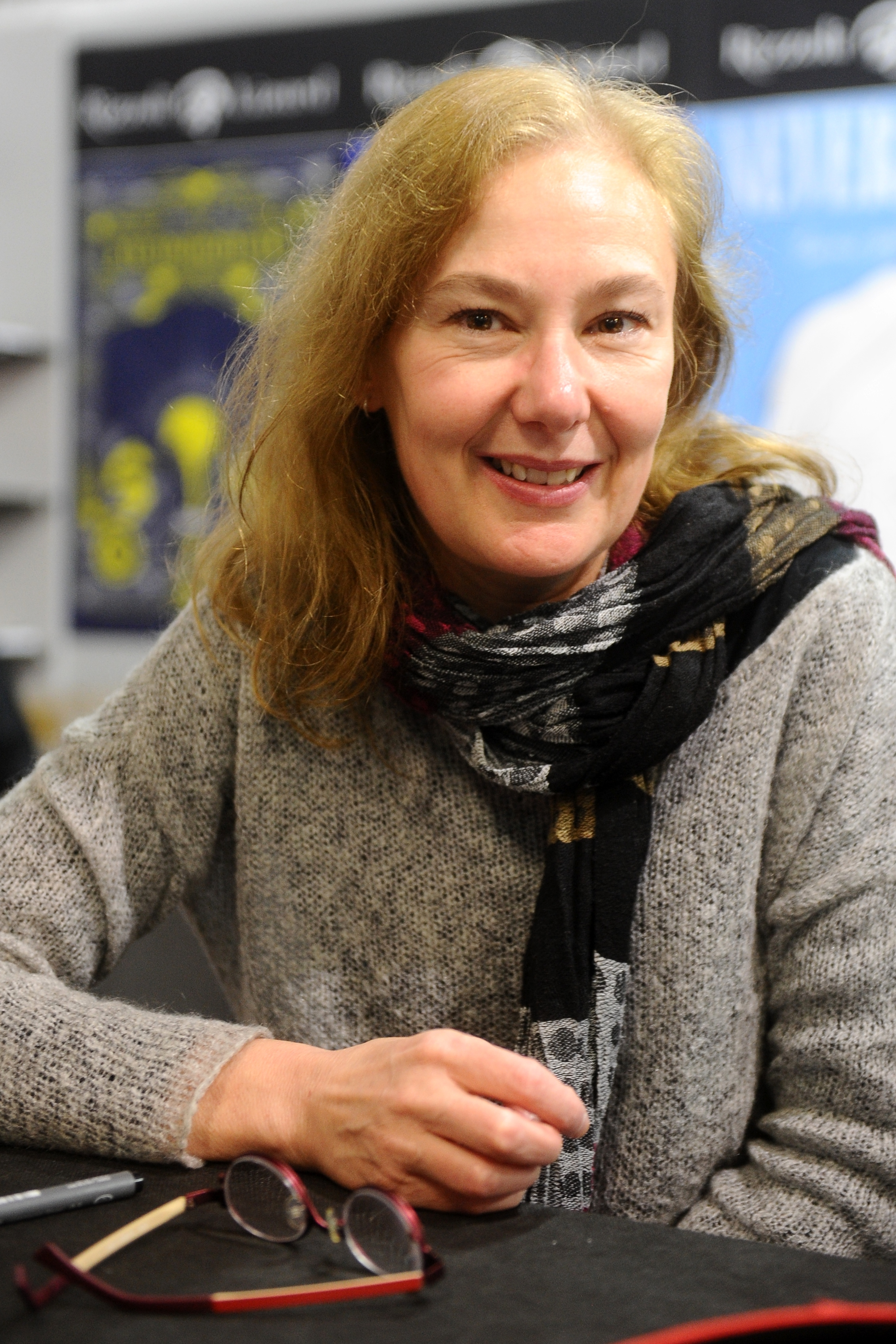 Silvia Ziche a Lucca Comics & Games 2014.